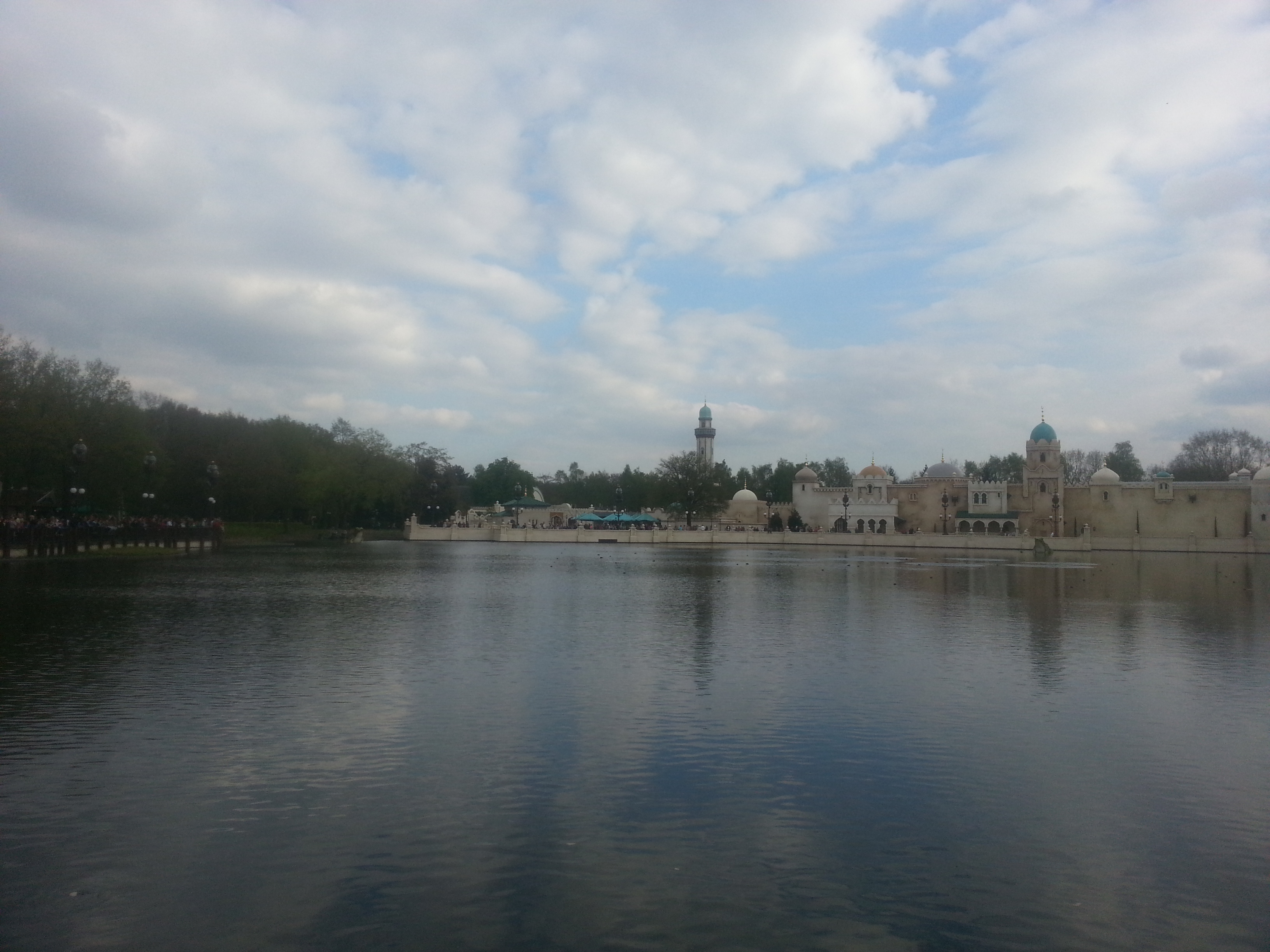 De locatie van de Aquanura in het Anderrijk.